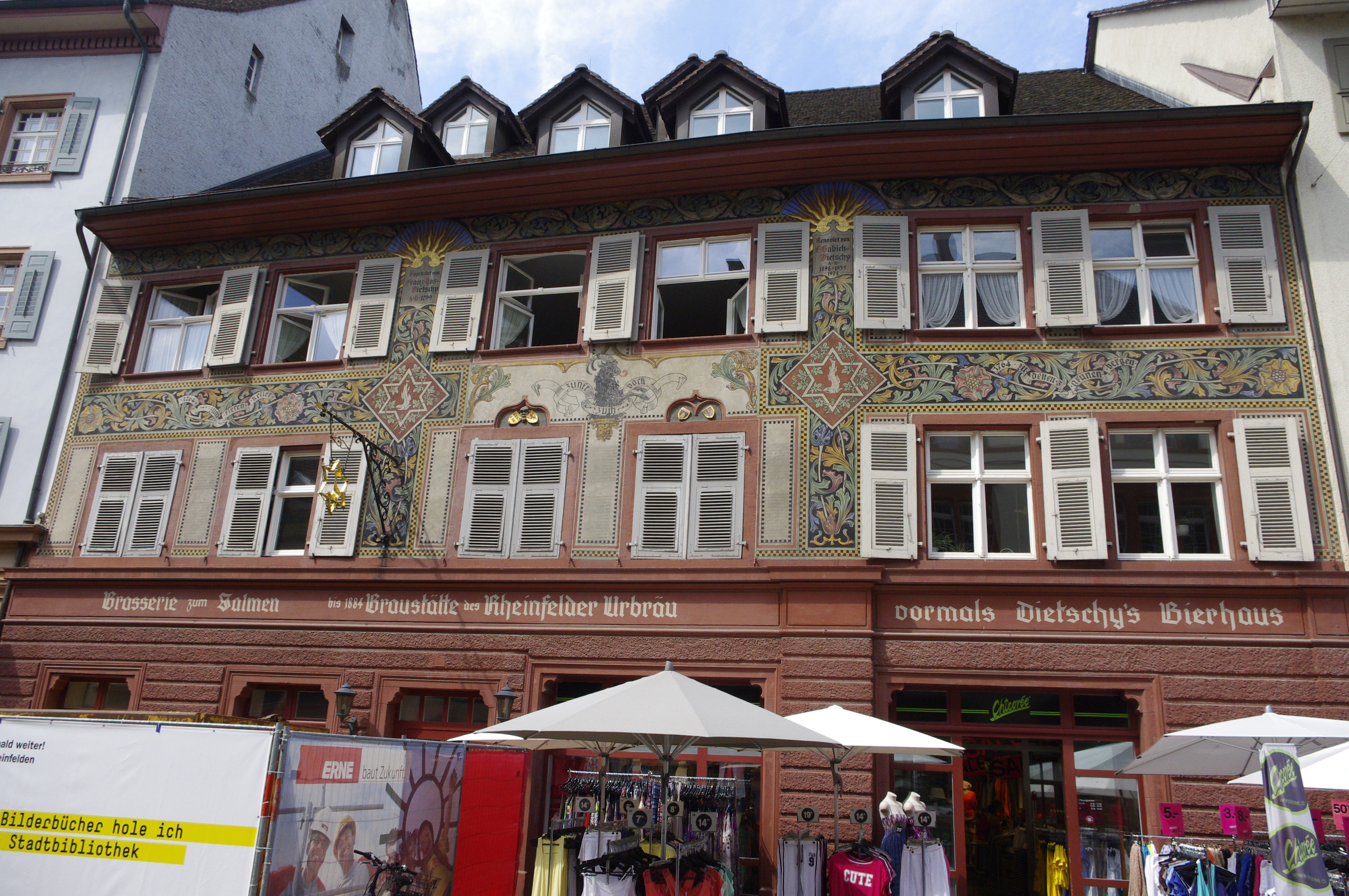 Haus zum Salmen mit der Inschrift: Brasserie zum Salmen bis 1884 Braustätte des Rheinfelder Urbräu vormals Dietschy's Bierhaus. Rheinfelden im Aargau, Schweiz